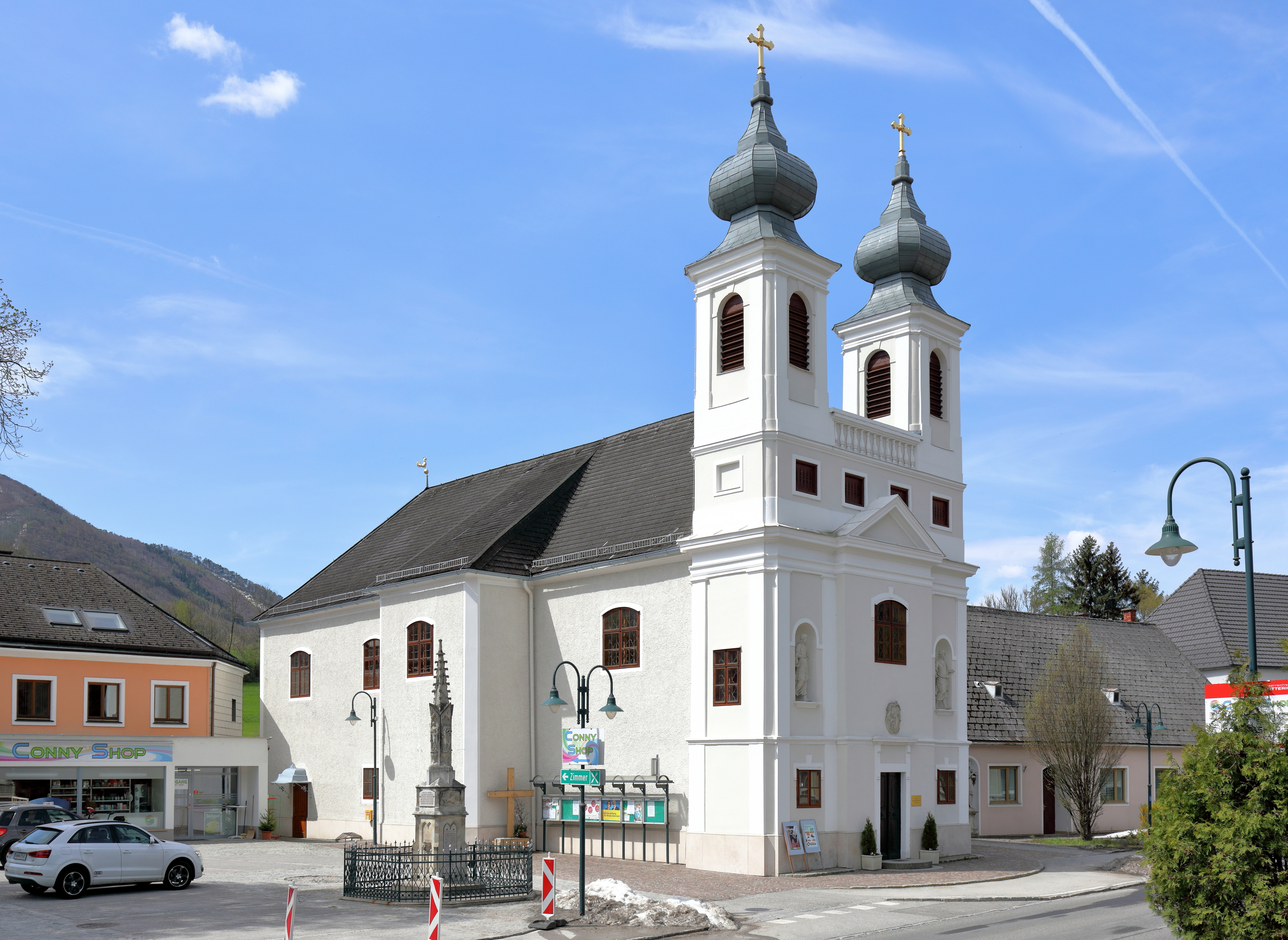 Die katholische Filial- und Wallfahrtskirche zum Leidenden Heiland in der Dornau in Thenneberg, ein Ortsteil der niederösterreichischen Marktgemeinde Altenmarkt an der Triesting. Die spätbarocke, zweijochige Kuppelkirche mit seichten Querhausarmen und Doppelturmfassade wurde von 1764 bis 1766 errichtet und 1773 erweitert.